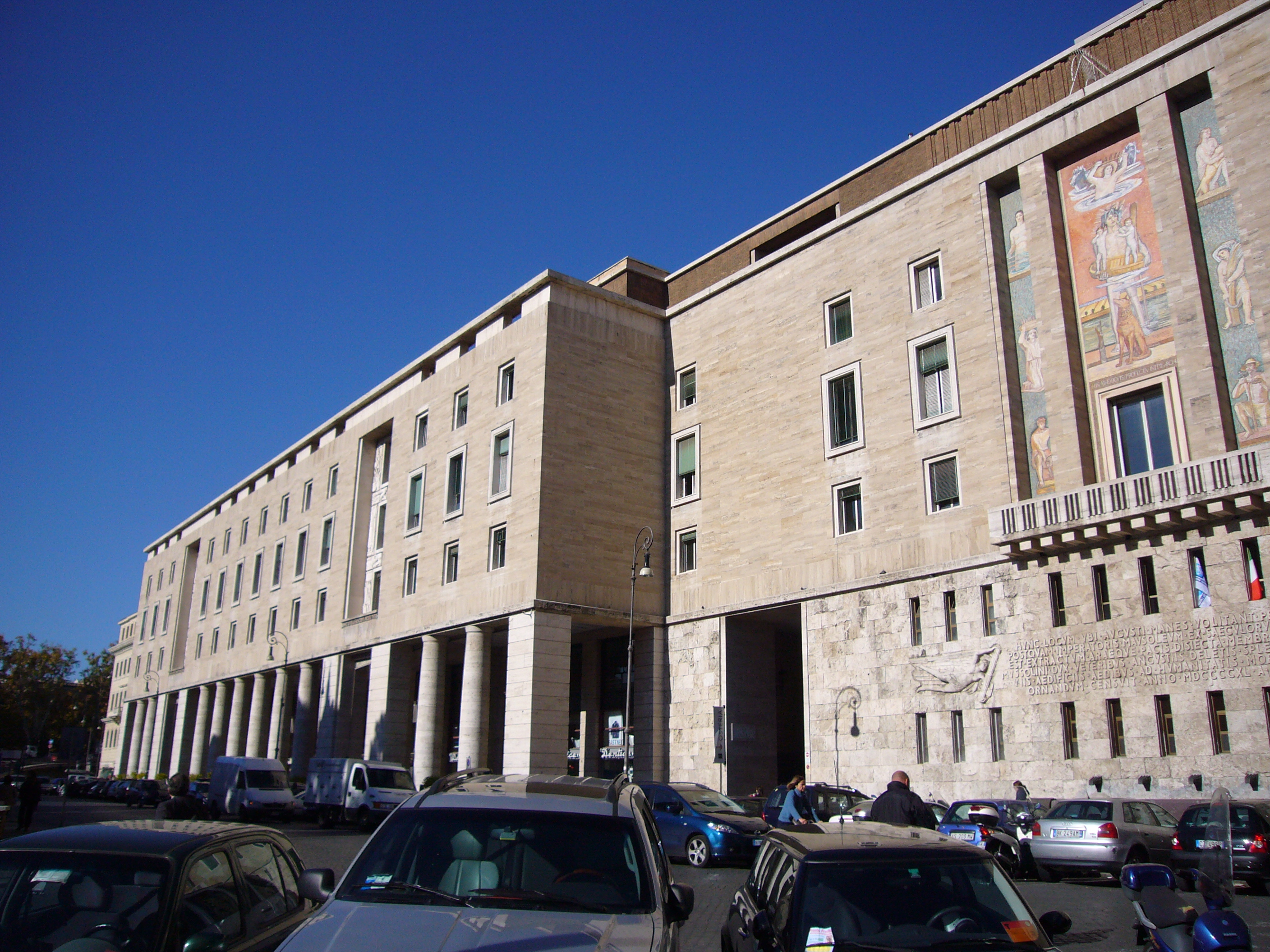 Roma, piazza Augusto Imperatore, lato via dei Pontefici - palazzo INPS.